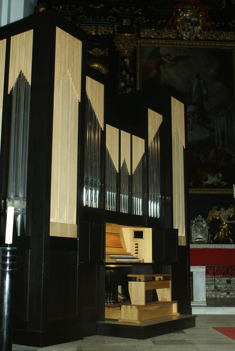 Symphonische Orgel in Leoben St. Xaver